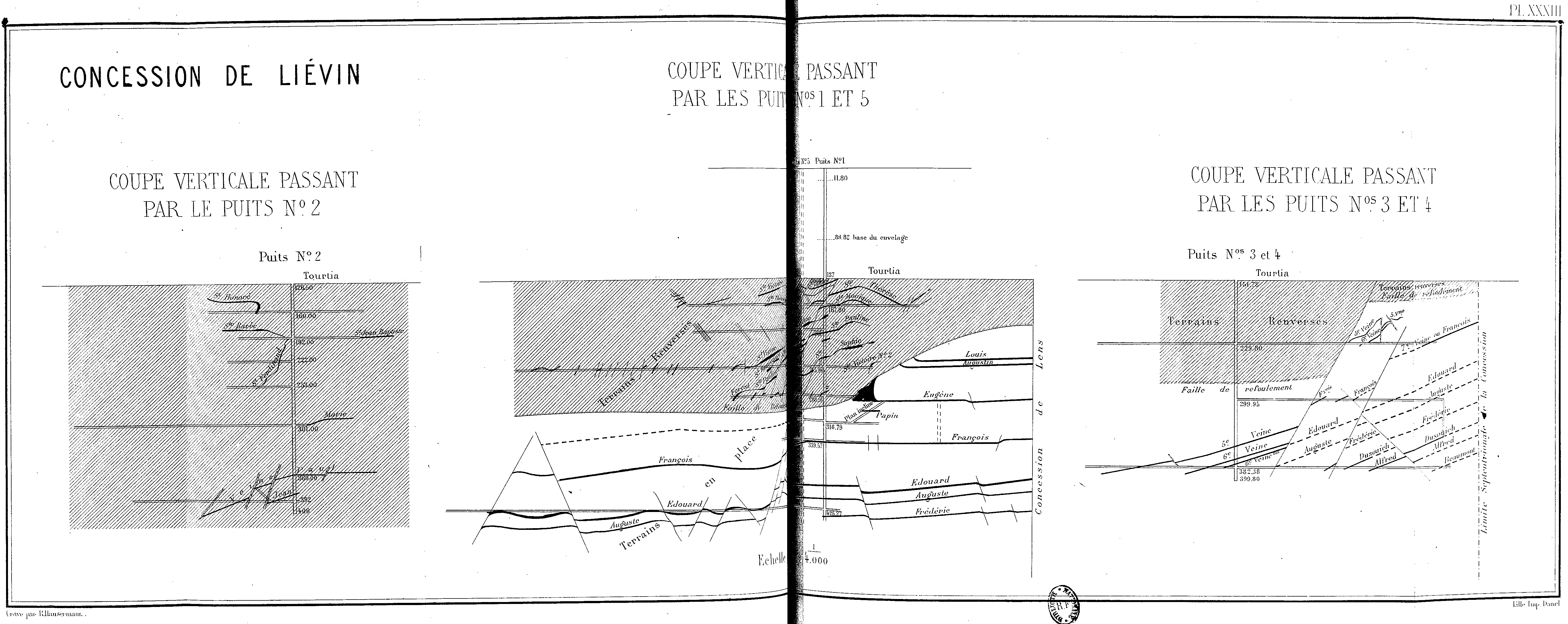 Coupe verticale via plusieurs puits de la Compagnie des mines de Liévin vers 1880.